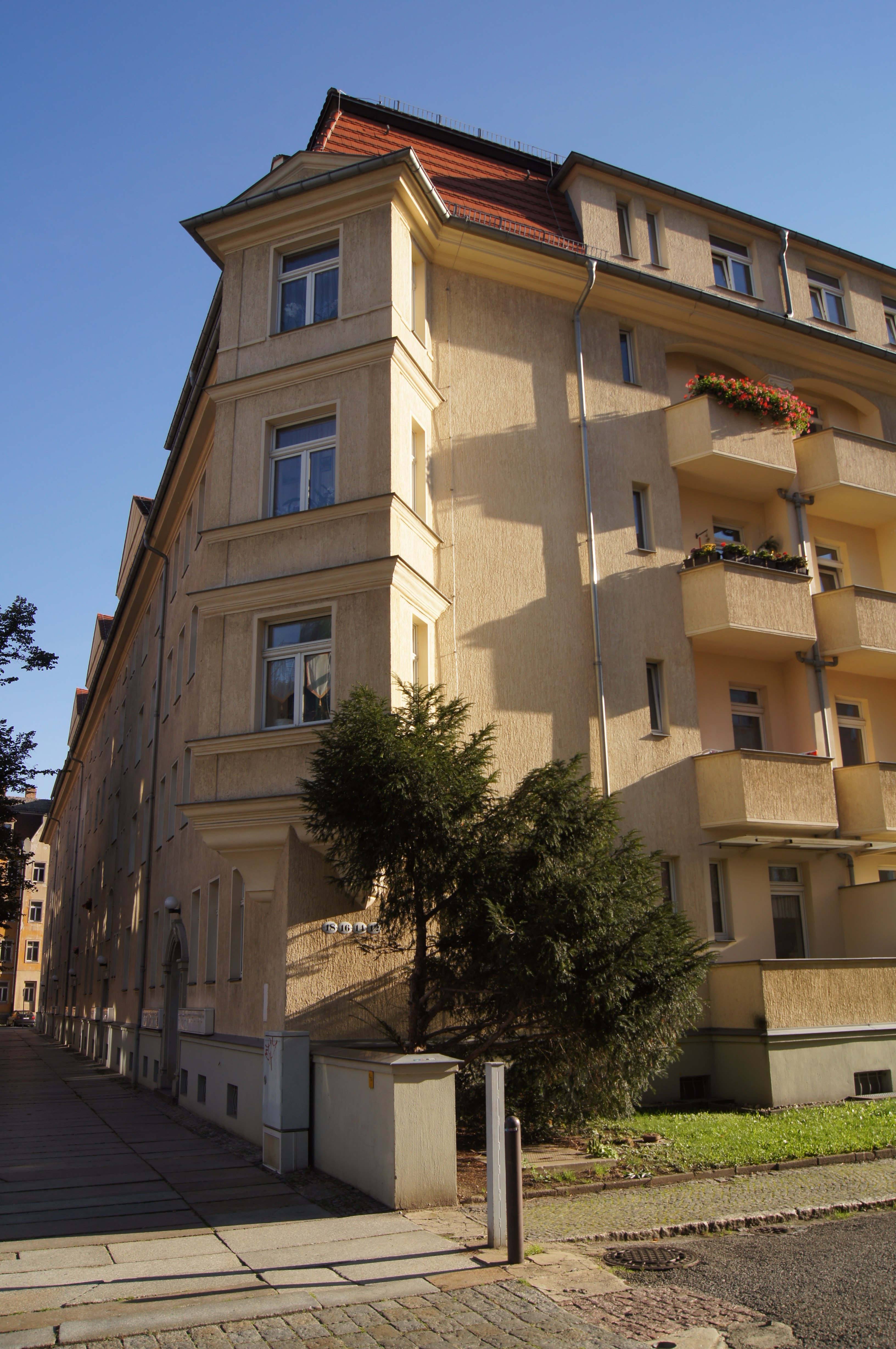 Kulturdenkmal (Lage sh. Dateiname) in Dresden-Neustadt Denkmalgeschütztes Gebäude in Dresden-Löbtau Saxoniastraße 18-28. Die Saxoniastraße befindet sich in Löbtau und verläuft hinter dem Heizkraftwerk Nossener Brücke zwischen Oederaner und Freiberger Straße. Die Häuser an der Straße sind in geschlossener Bebauung 3- bis 4-geschossig für die Arbeiter im ehemals dort befindlichen Industriegebiet errichtet worden. Ihre Benennung geht auf das Jahr 1897 zurück und ist der weiblichen Symbolfigur für Sachsen “Saxonia” gewidmet. Die Straße hieß seit 1895 zunächst Kanonenbohrwerksstraße, weil sich hier seit 1764 ein Kanonenbohrwerk befand. 1897 erfolgte die Umbenennung in Saxoniastraße.